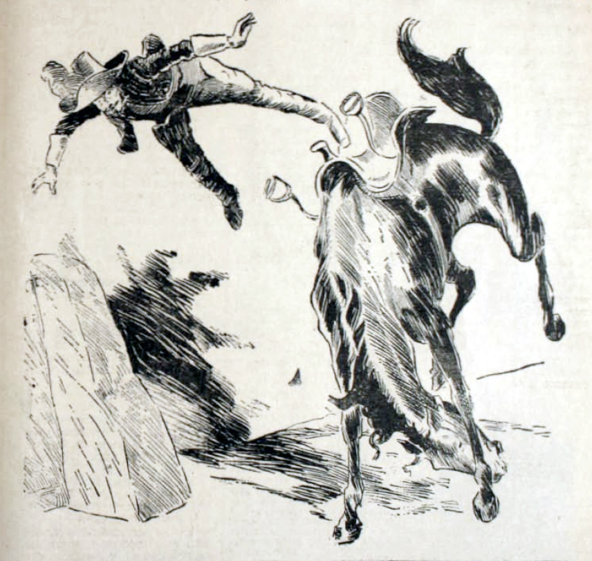 Ilustración que representa la muerte de Gabriel Cano y Aponte. El 11 de noviembre de 1733 murió a causa de una caída de su caballo durante unas celebraciones realizadas en la Plaza de Armas de Santiago de Chile. Gabriel Cano y Aponte (* Mora (Toledo), España, 1665 –† Santiago, Chile, 1733). Gobernador de Chile entre 1717 y 1733. Plaza de Armas de Santiago.